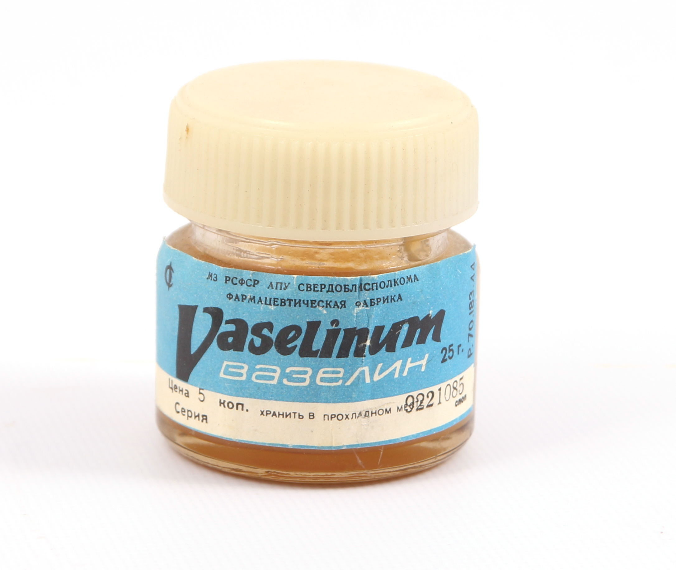 Баночка вазелина производства фармацевтической фабрики АПУ свердоблисполкома министерства здравохранения РСФСР